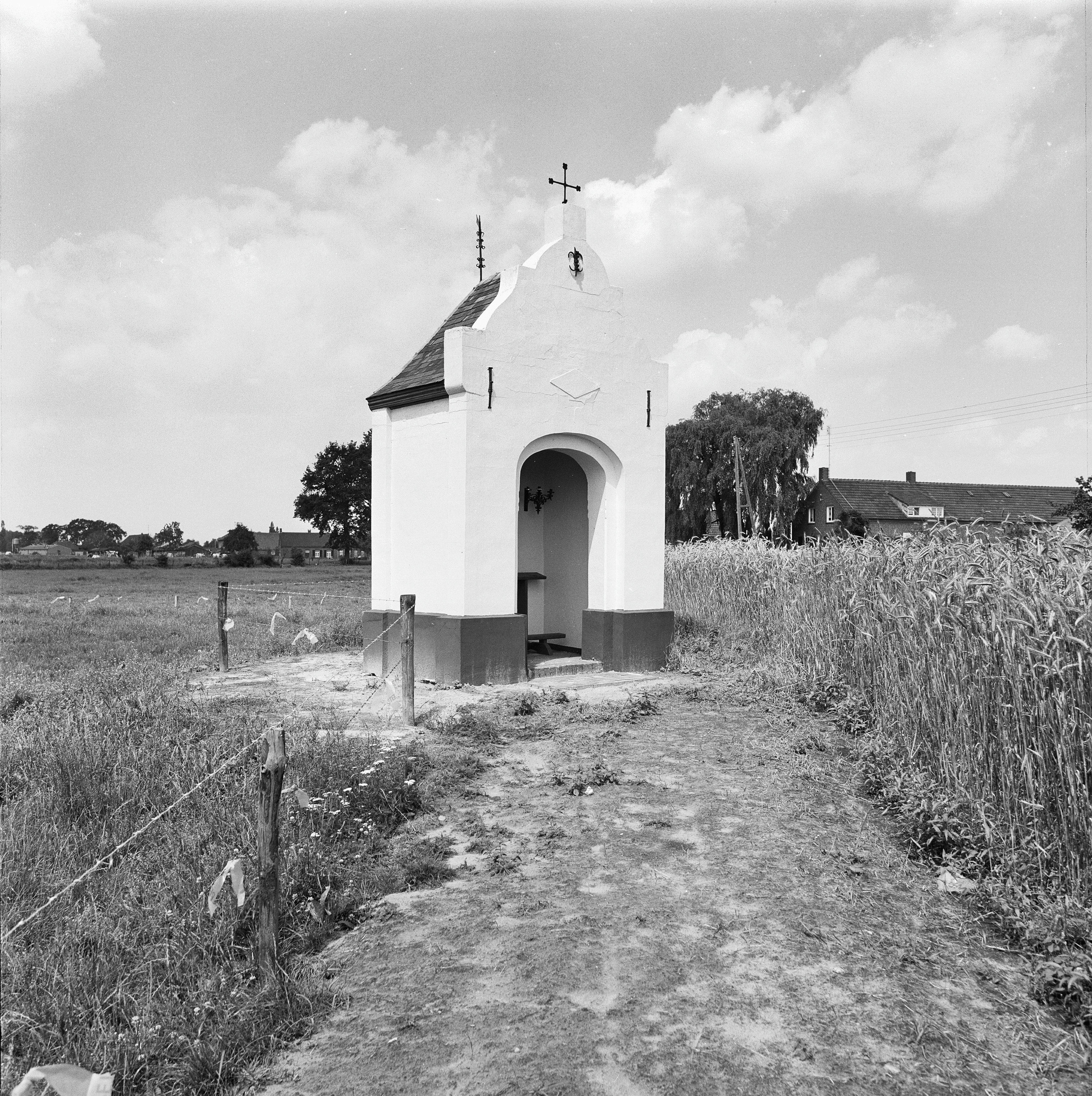 Sint Jozefkapel, exterieur